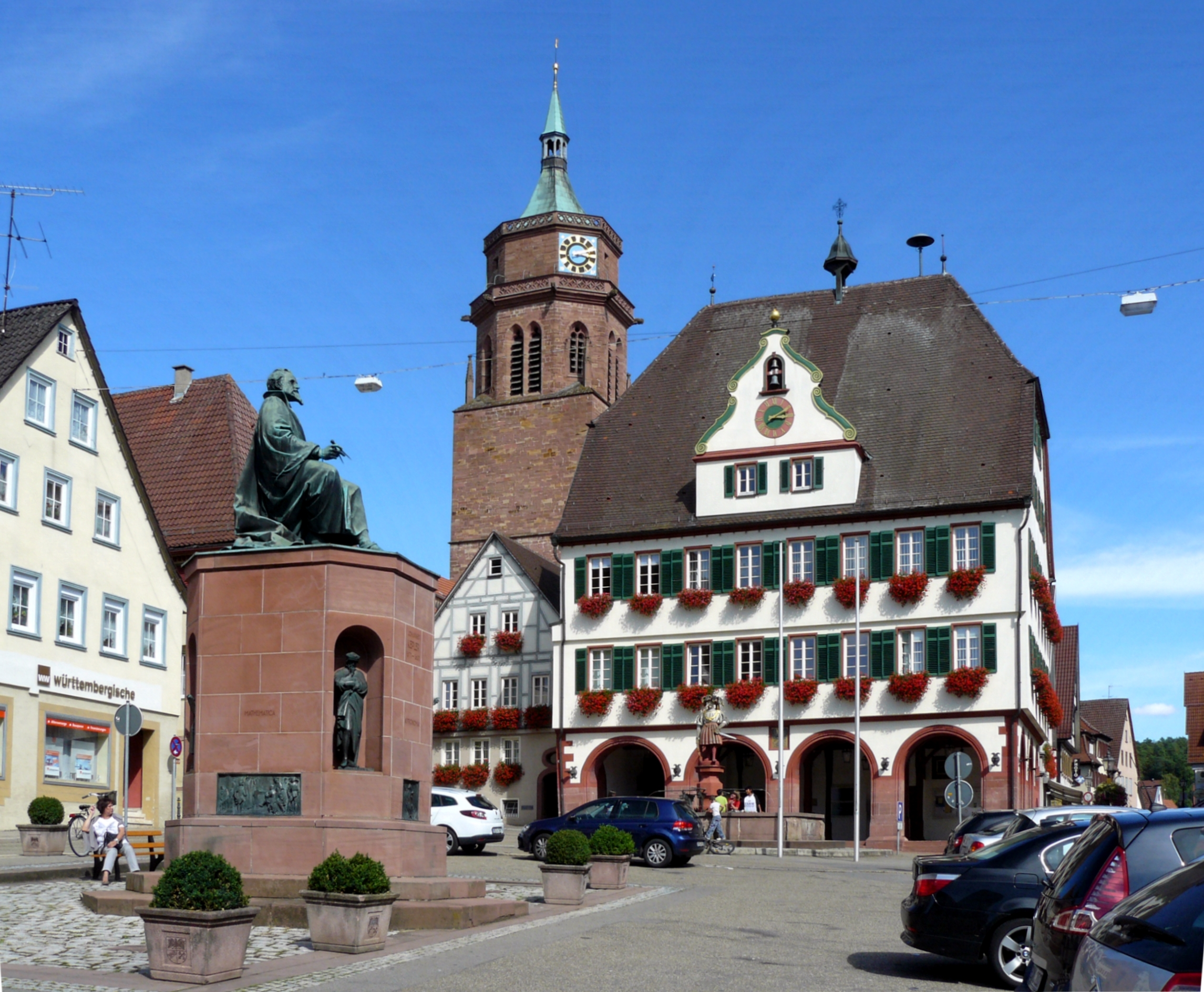 Keplerdenkmal und Rathaus in Weil der Stadt, im Hintergrund die Stadtkirche St. Peter und Paul